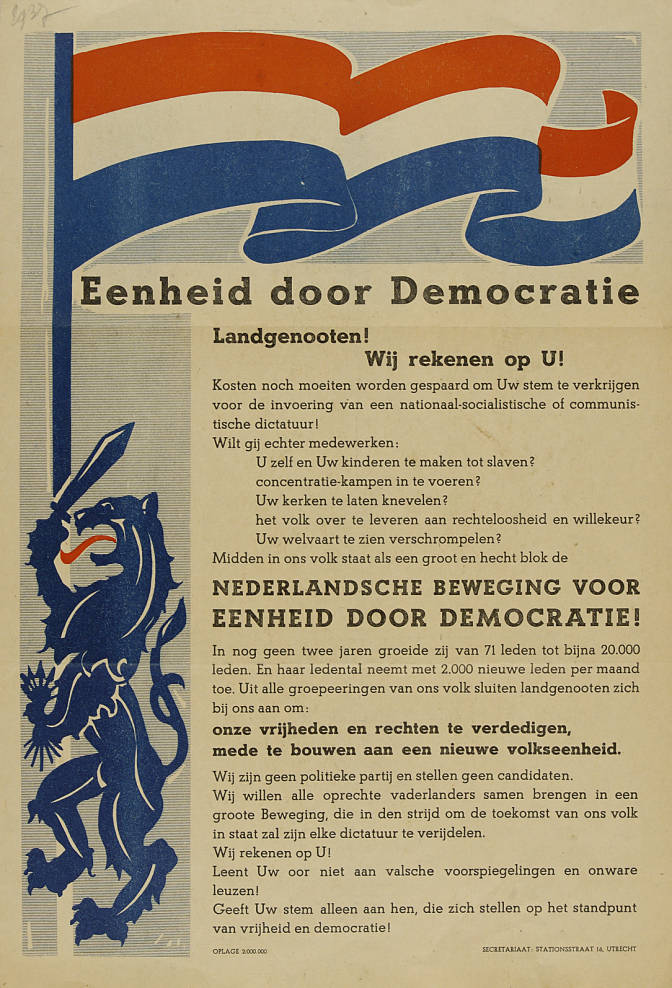 Eenheid door Democratie/Functie Tweede Kamerverkiezingen/Jaar 1937/Datum verkiezingen 26-5-1937/Tekst Eenheid door Democratie - Nederlandsche beweging voor eenheid door democratie!